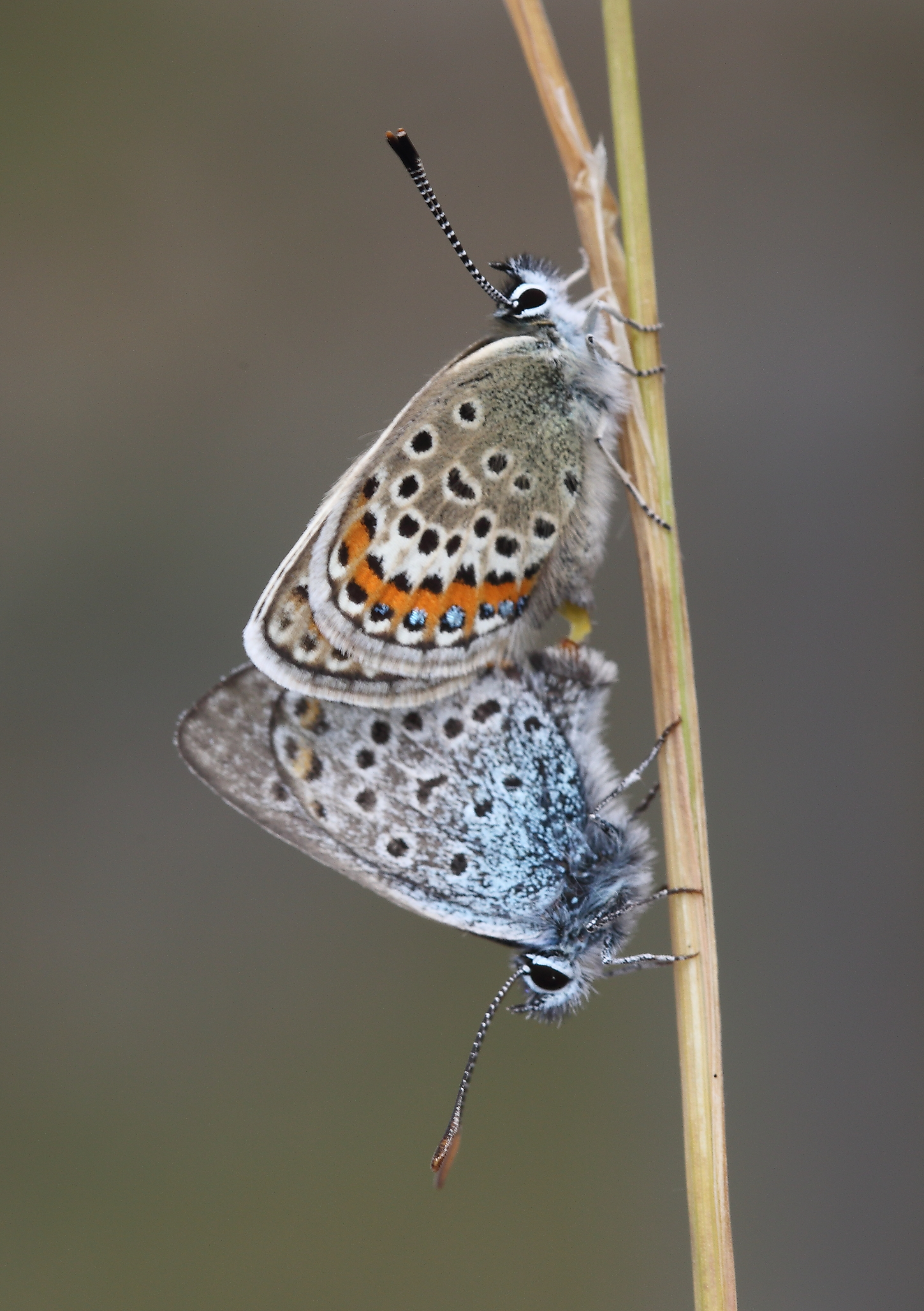 glesyn serennog, Y Gogarth, Llandudno